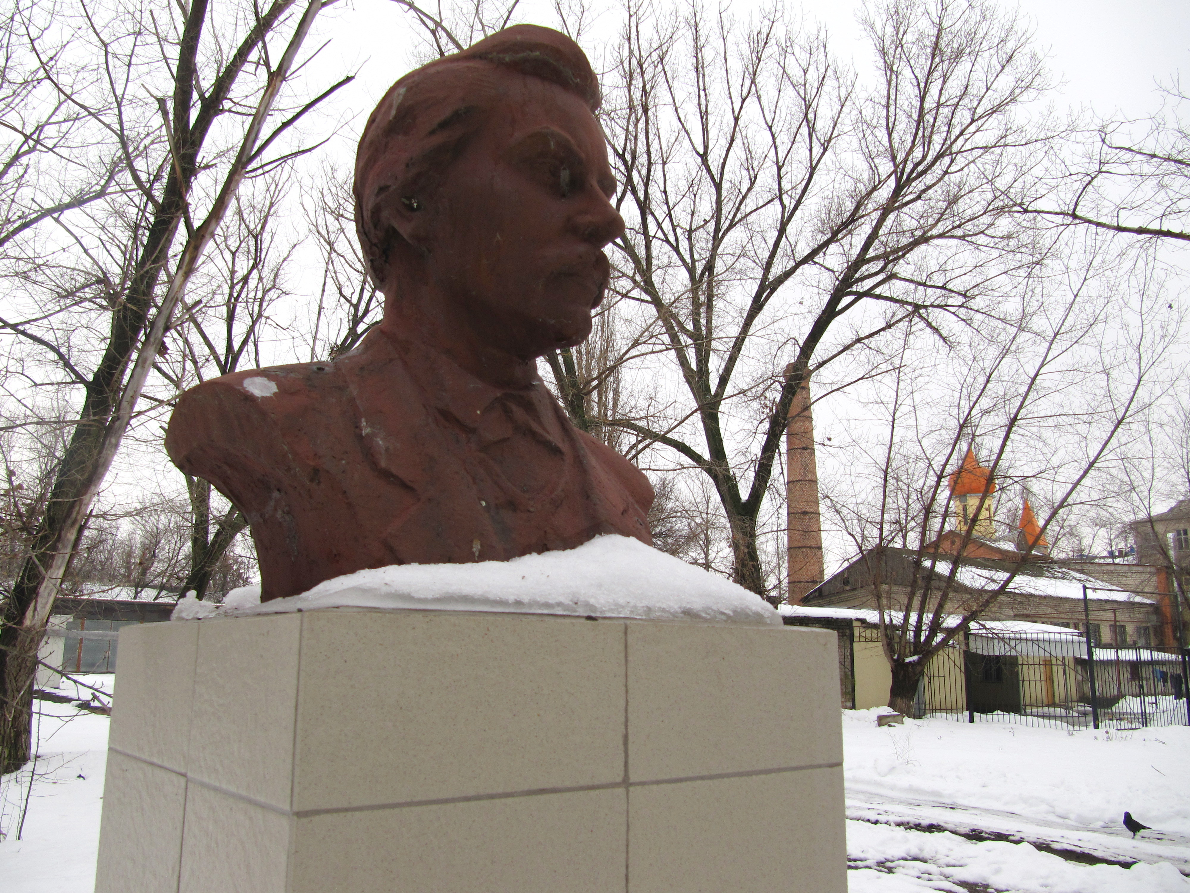 Бюст лікаря-письменника Степана Руданського на території Луганського онкодиспансера.